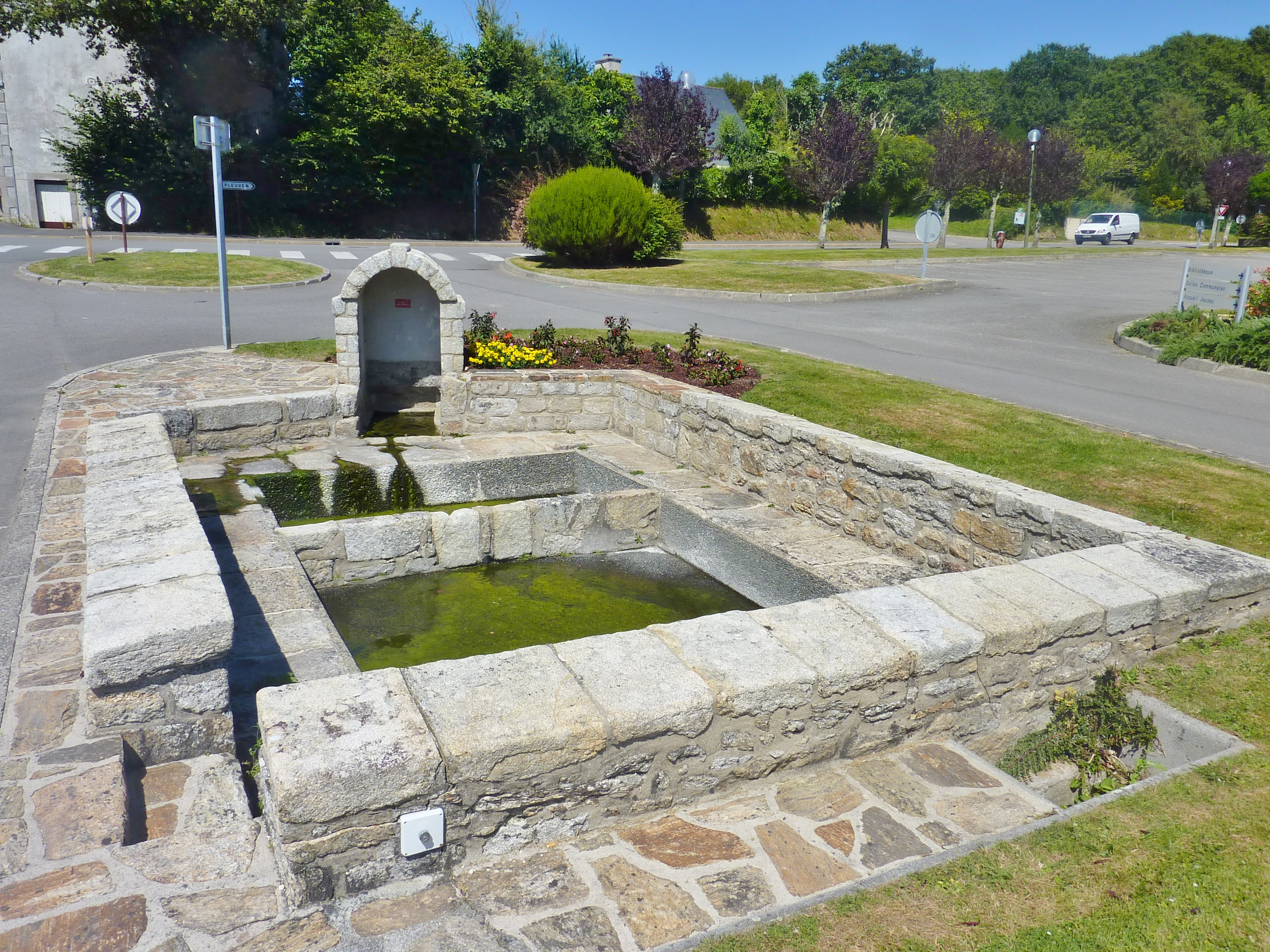 Clohars-Fouesnant : la fontaine de Kerper, place de la mairie